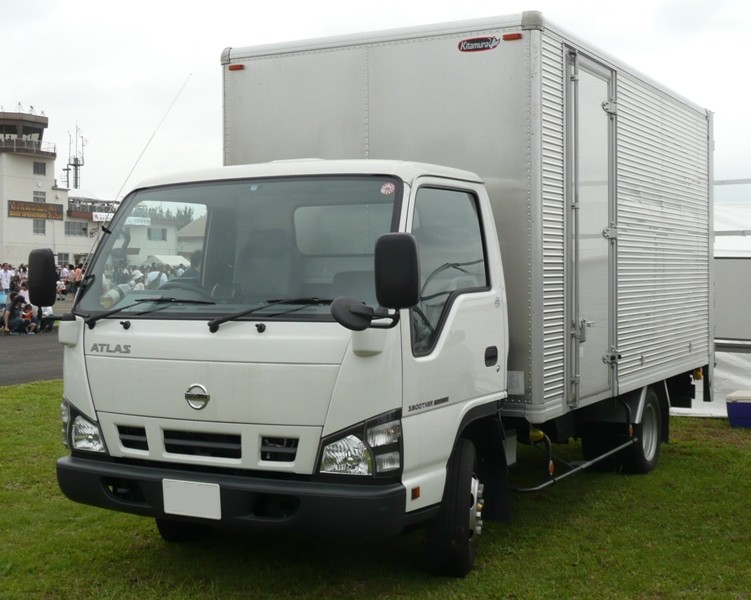 Nissan Atlas 20.